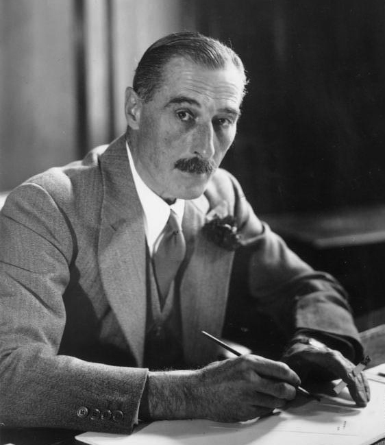 Scherl: Sir Nevile Henderson, der neue Britische Botschafter in Berlin. Foto:Dorneth, 5. Mai 1937 5774-37